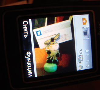 камера z710i в действии